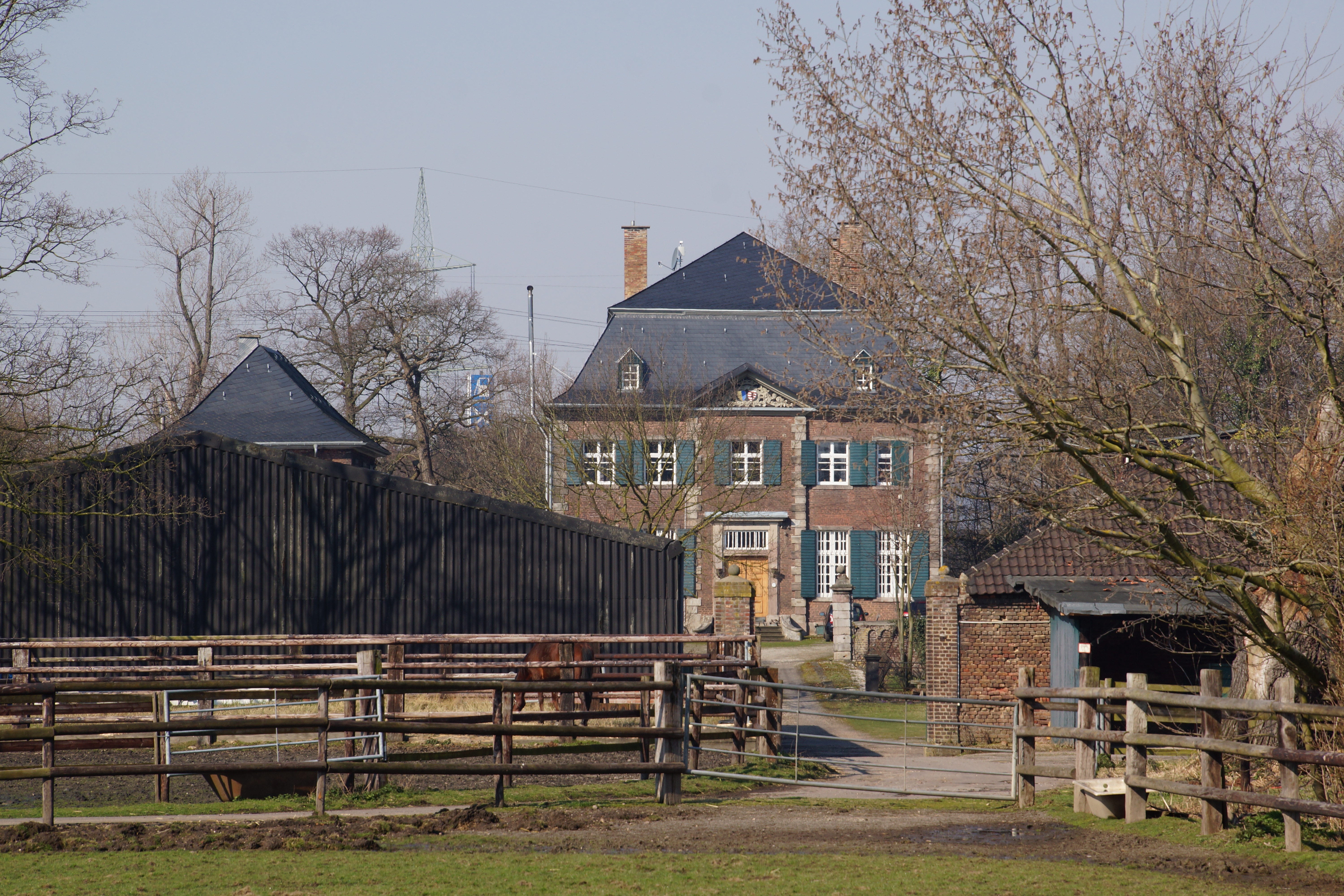 Rittergut Haus Vorst in Frechen This is a photograph of an architectural monument. 4